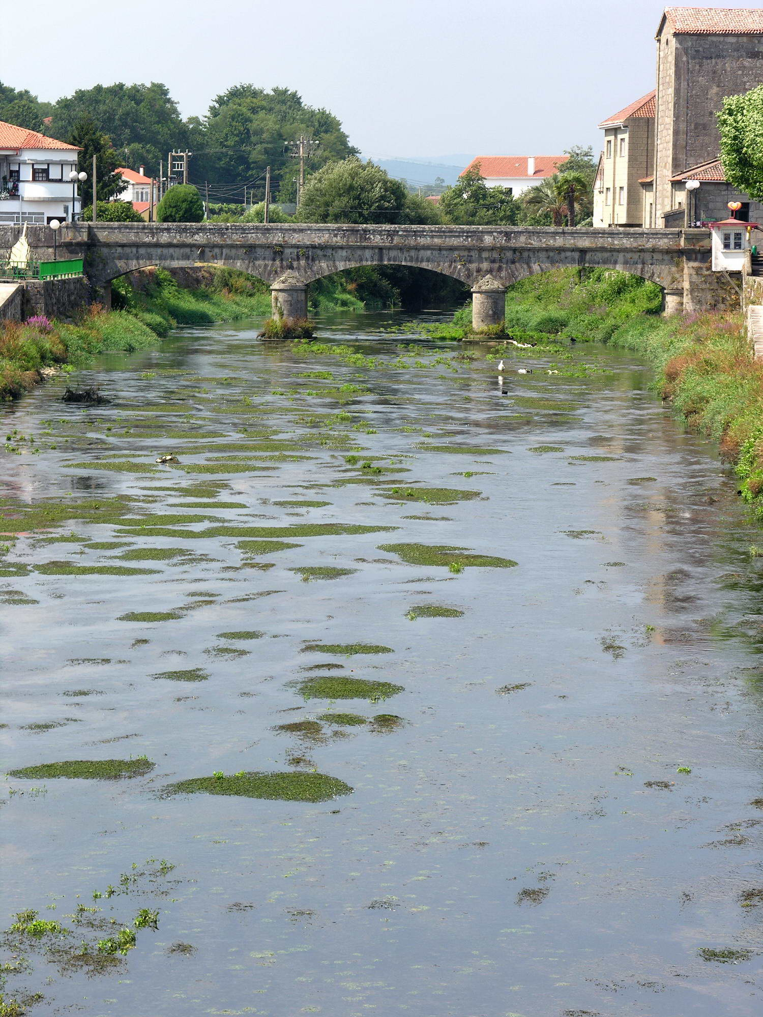 Río Sar, Padrón, Galicia Publish by= Luis Miguel Bugallo Sánchez.